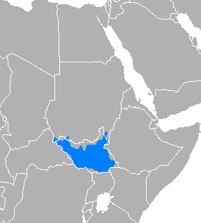 Árabe yuba